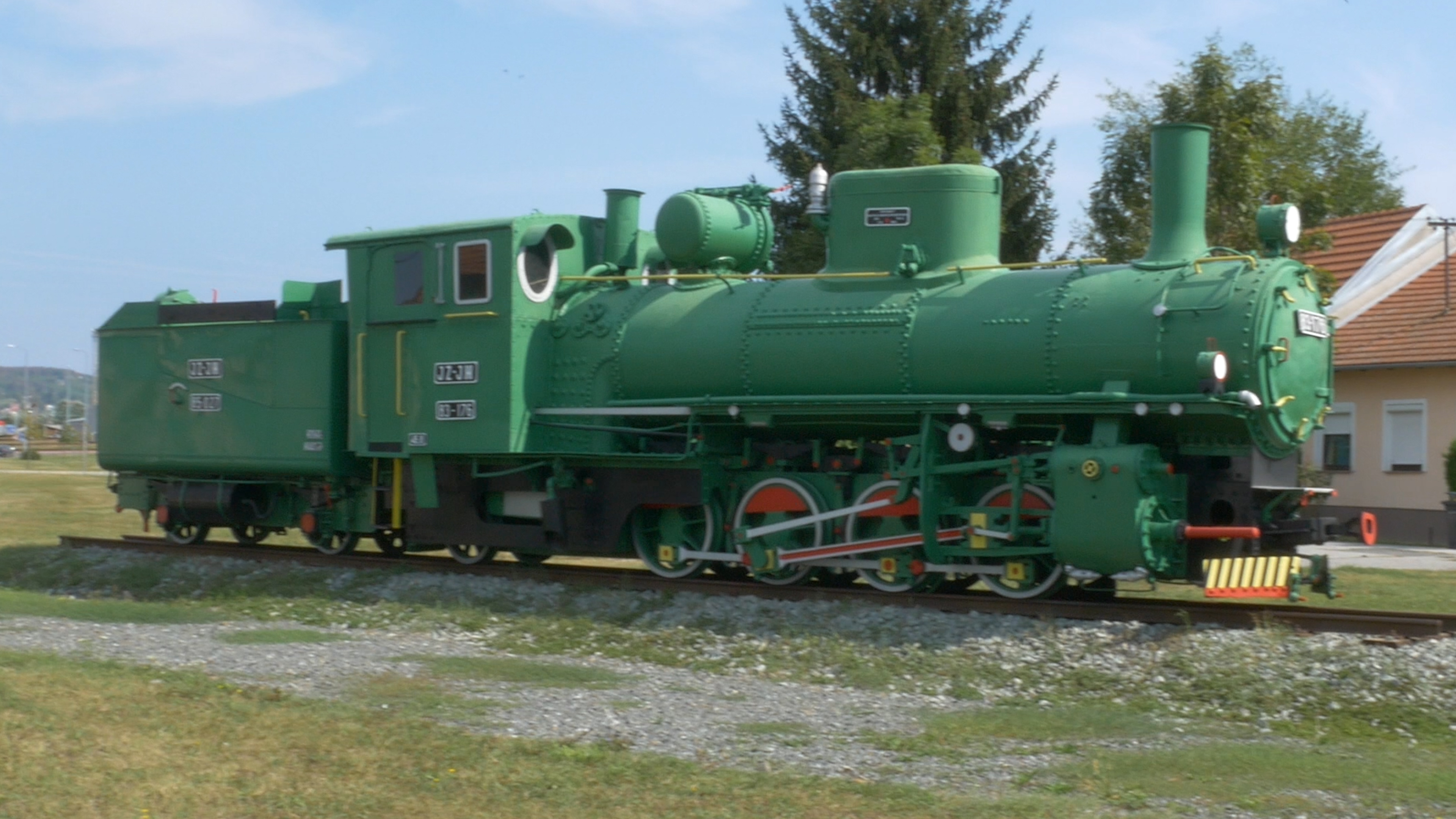 Industrijski park u Slavonskom Brodu